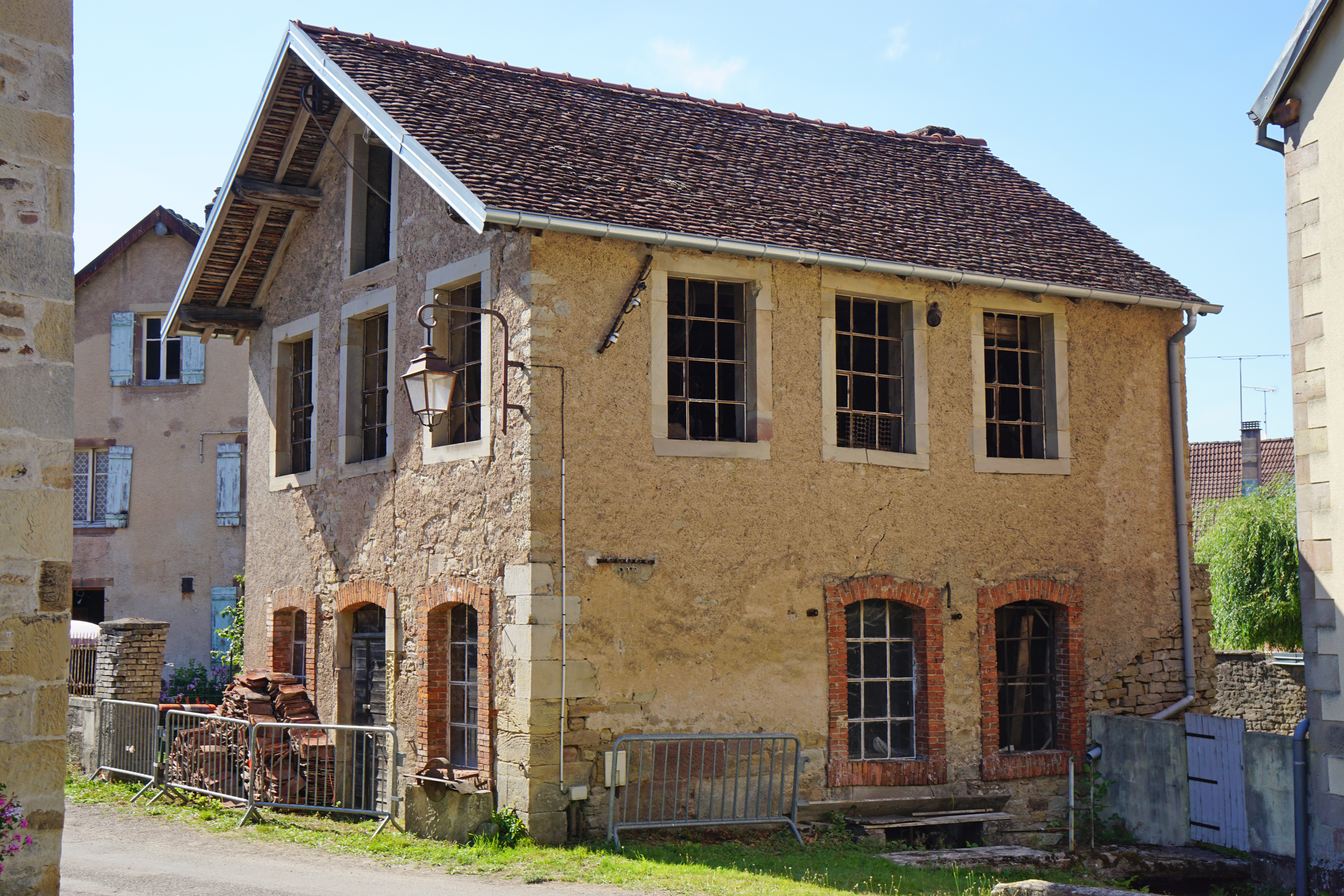 L'ancienne ferme-clouterie Hory à Clairegoutte.